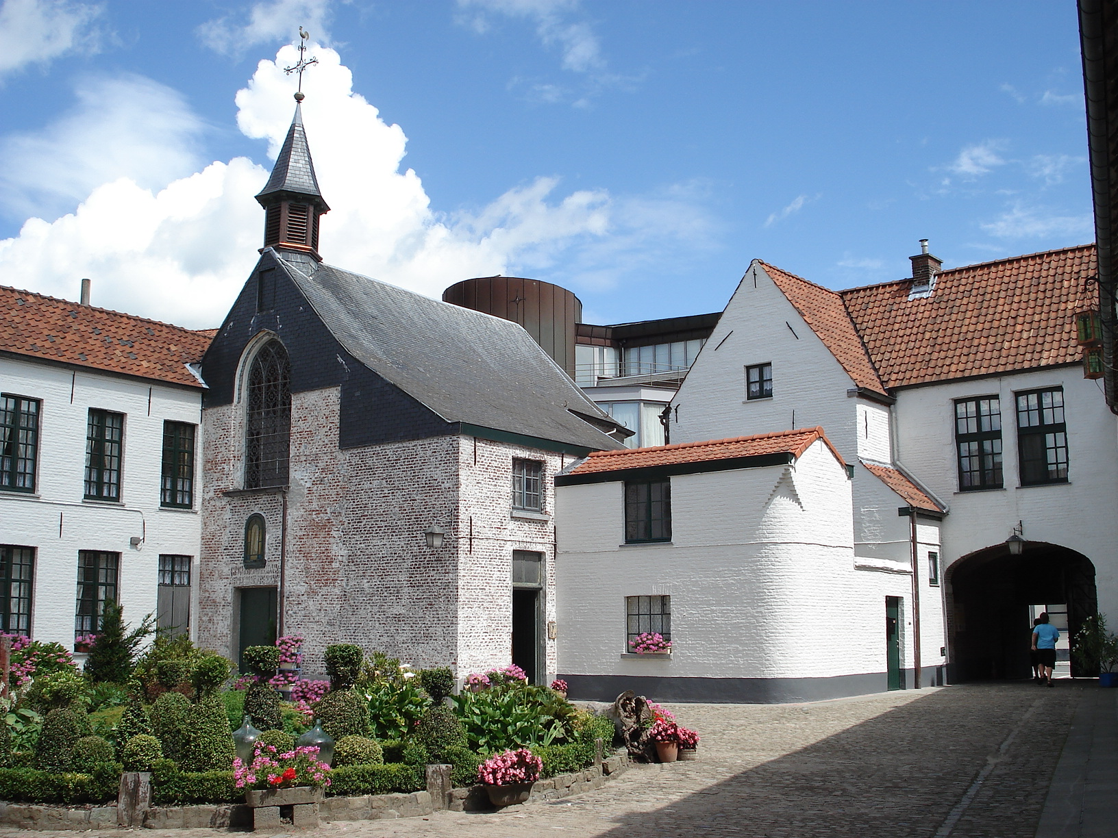 Béguinage d'Audenarde (Belgique). Première cour: chapelle à gauche, portail d'entrée à droite.